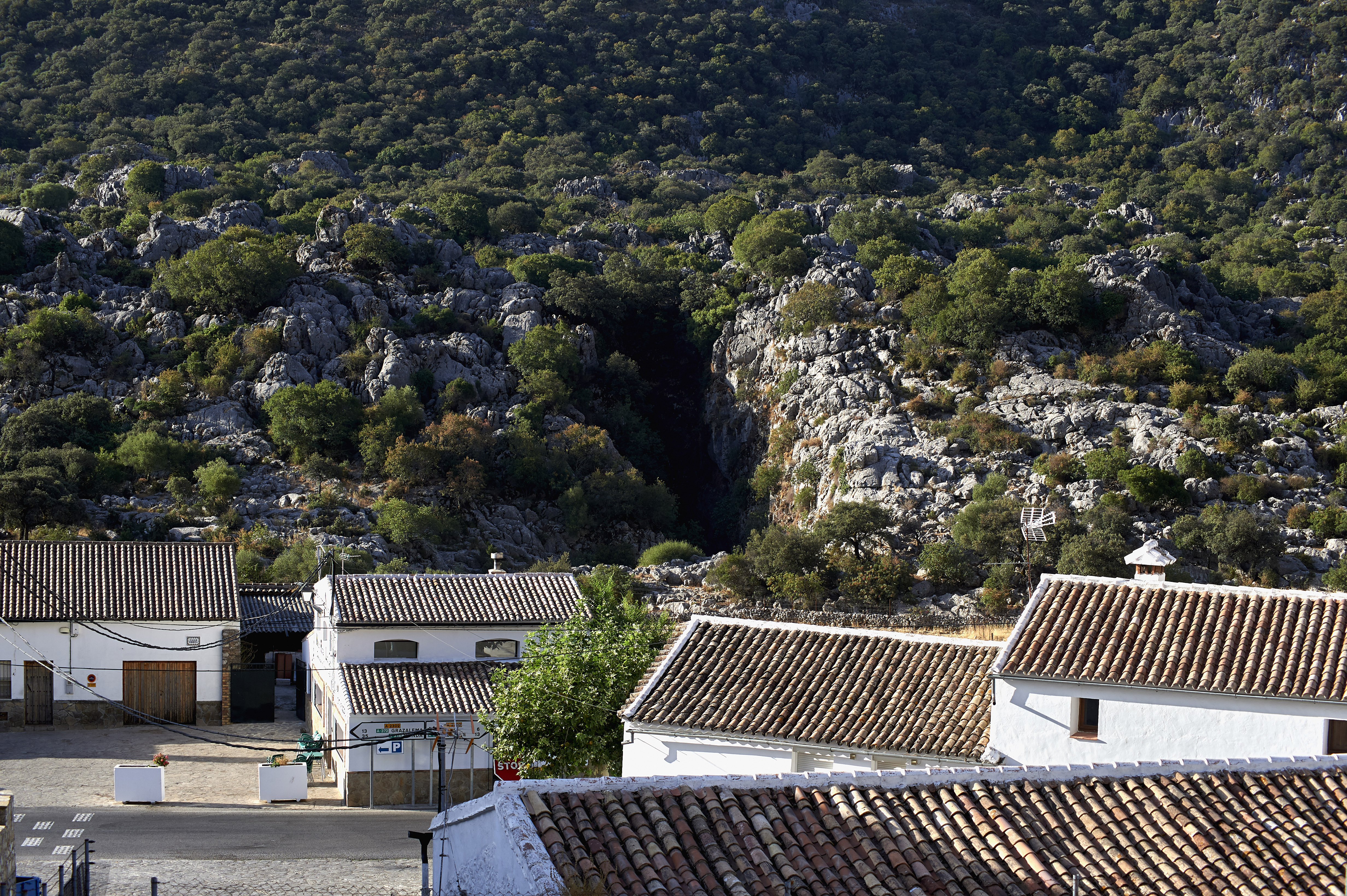 Vista de la entrada a la sima de Villaluenga (Villaluenga del Rosario, Cádiz) desde el pueblo.